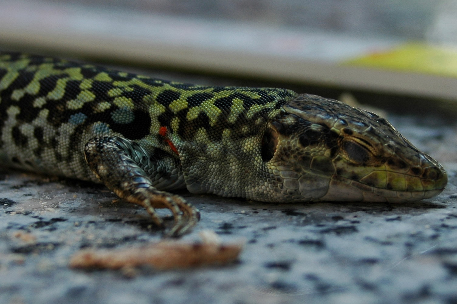 Siciliaanse muurhagedis.